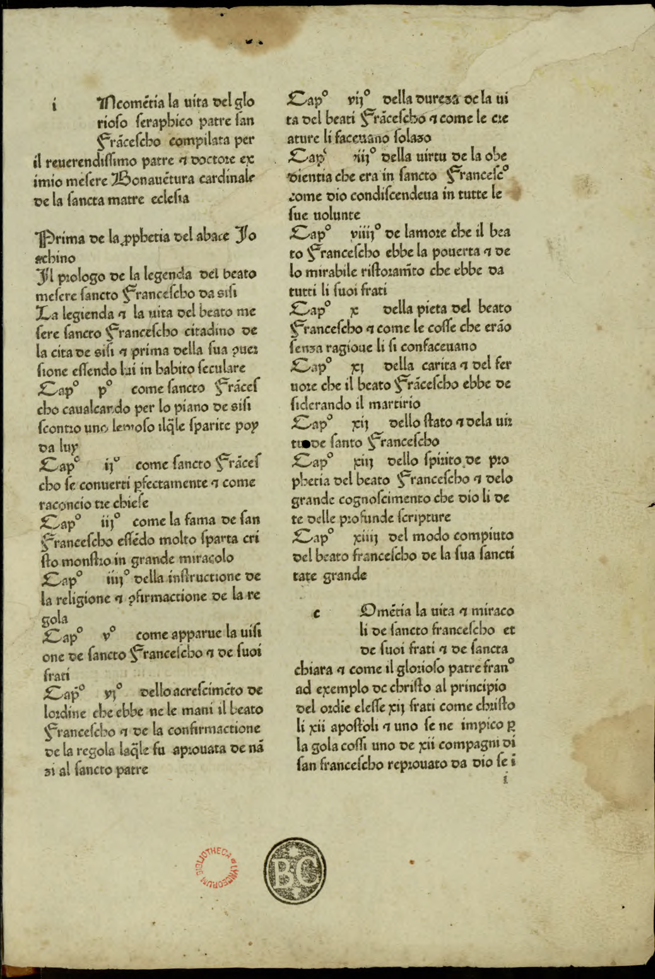 Legenda maior (italiano). - in Milano : per magistro Antonio Zaroto da Parma, MCCCCLXXVII adi VI del mese de februario e stata impressa questa opera. - 120 c. ; [*]⁴, a-n⁸, o¹² ; 4º . Incipit (carta a1r)